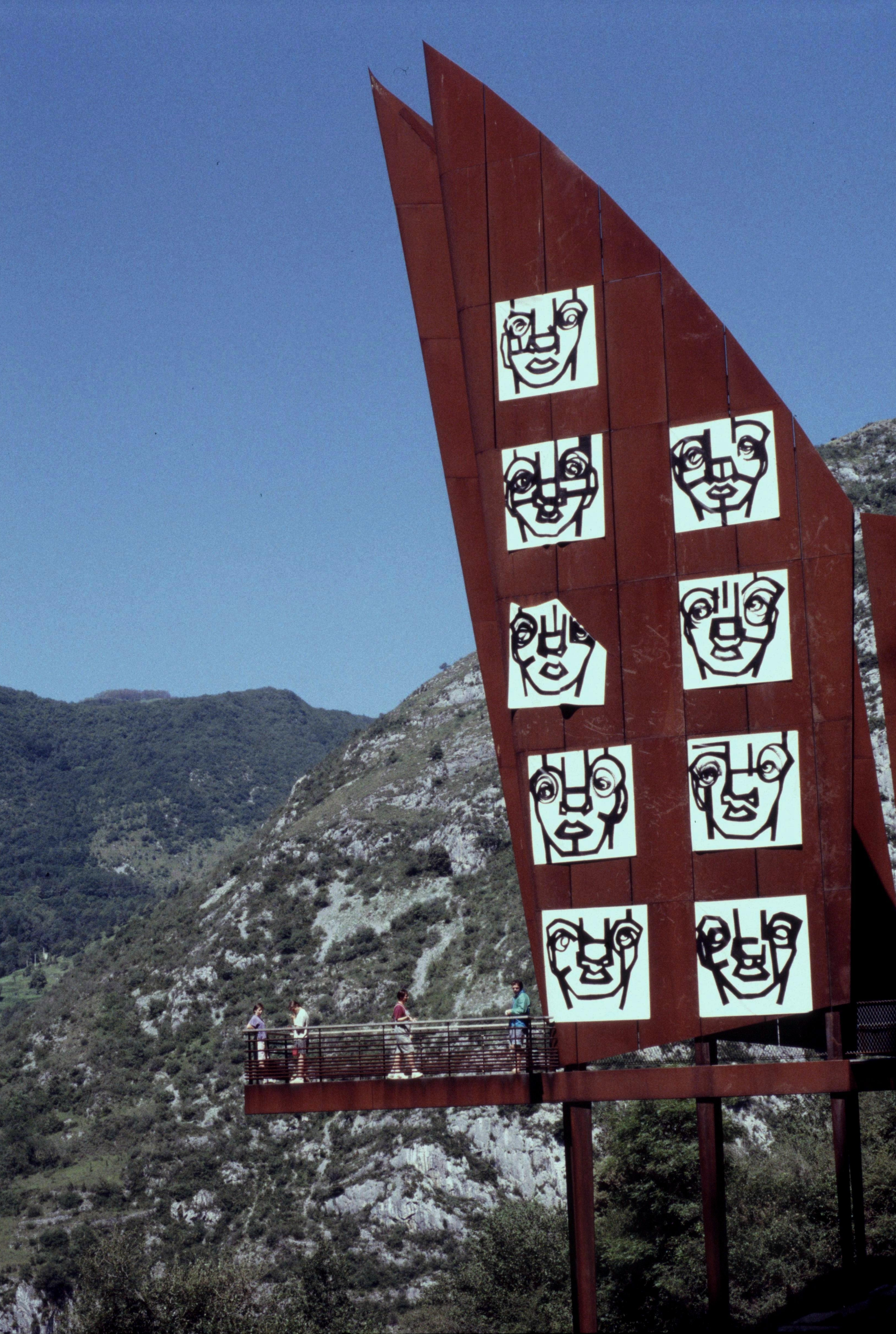 Ariege Grotte De Niaux Acceuil 071995